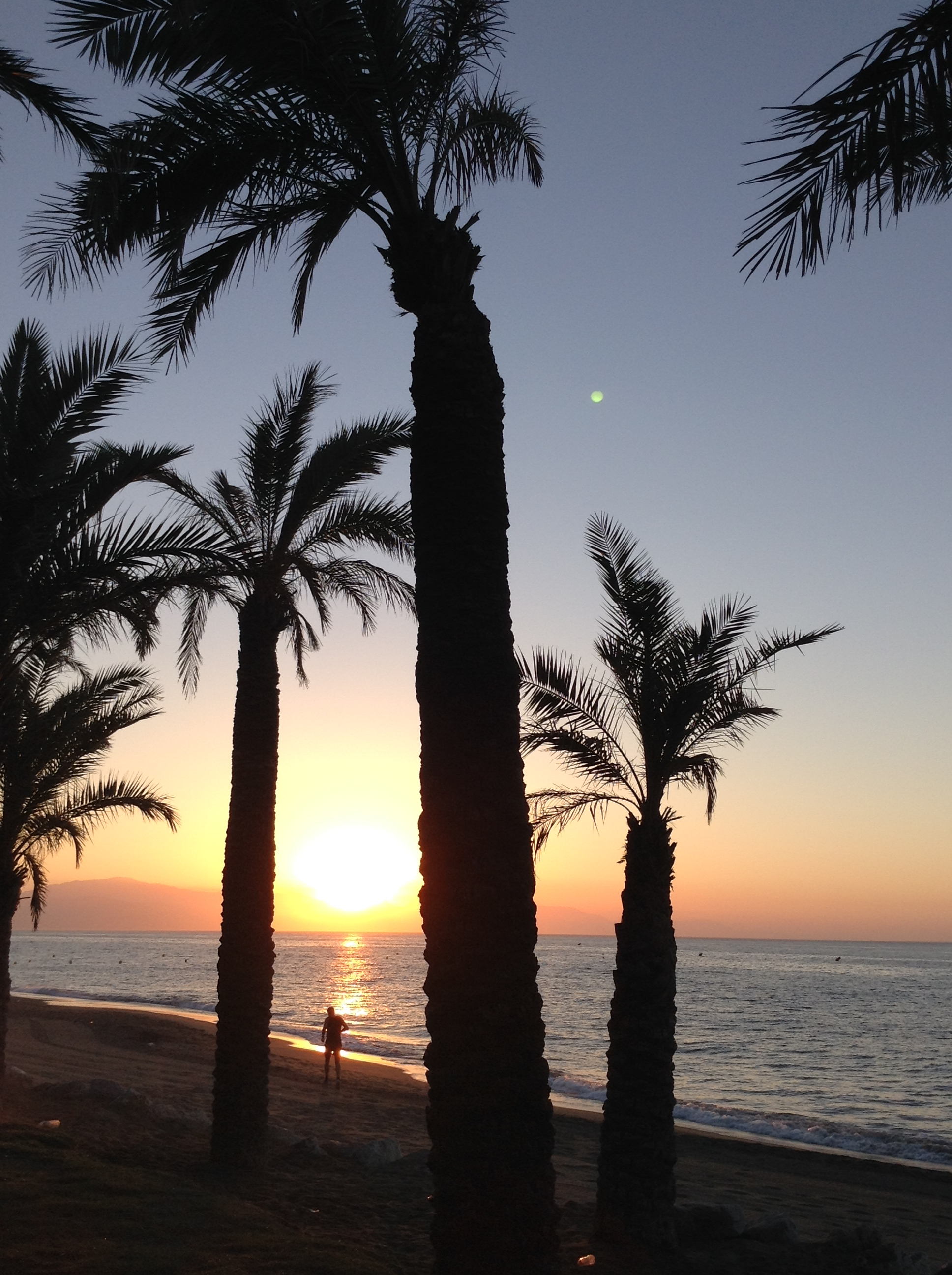 29620 Torremolinos, Málaga, Spain